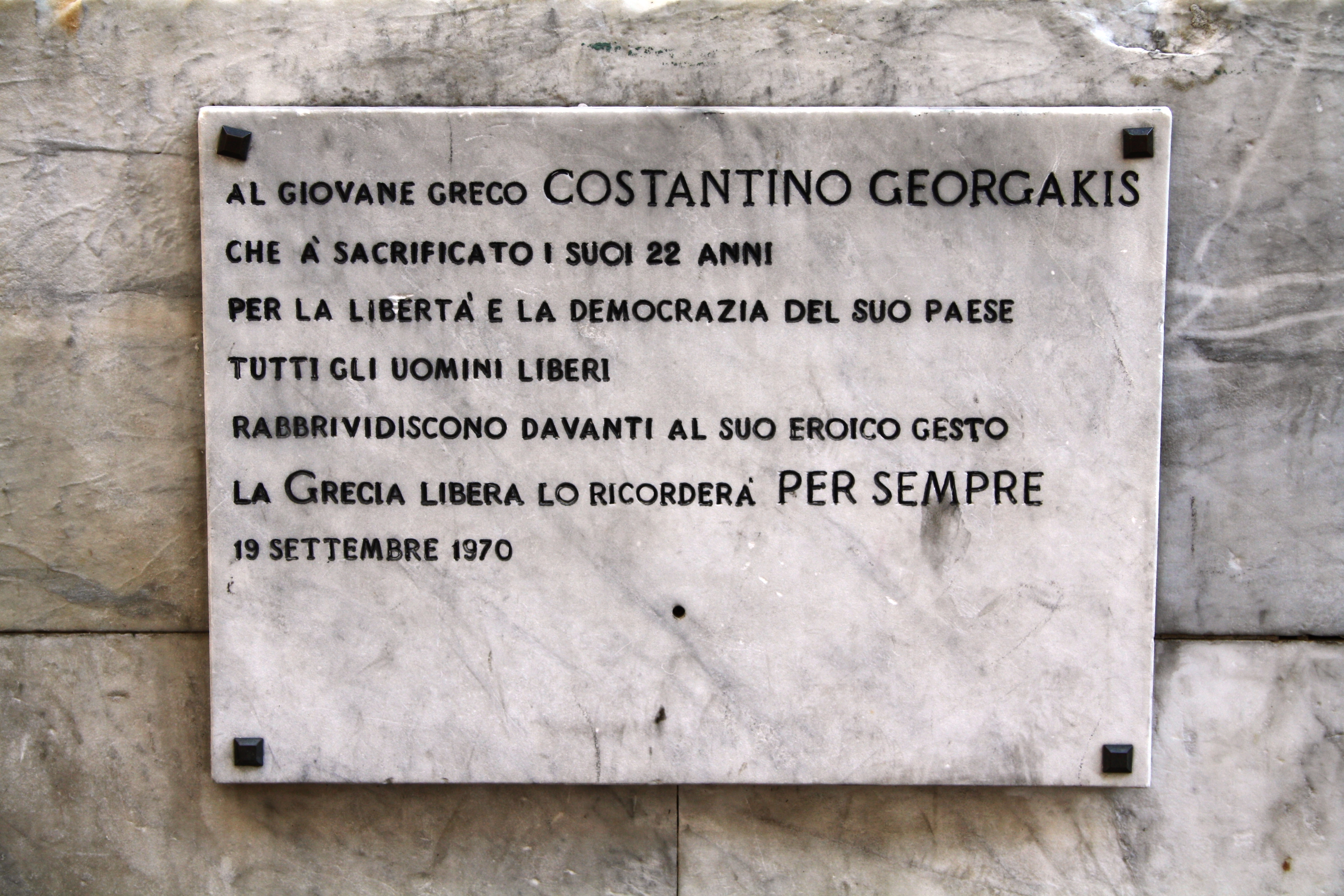 Lapide in memoria di Kostas (Costantino) Georgakis, affissa a Genova, dalle scale di Palazzo Ducale, lato Piazza Matteotti